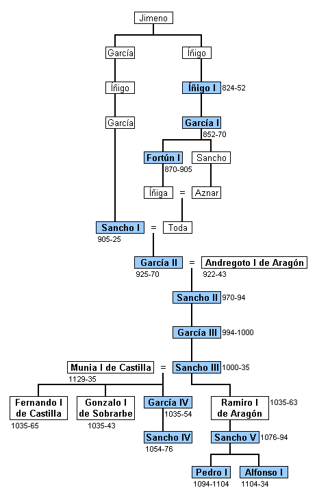 Árbol genealógico de los reyes de Pamplona (Navarra) de las dinastías íñiga y jimena.